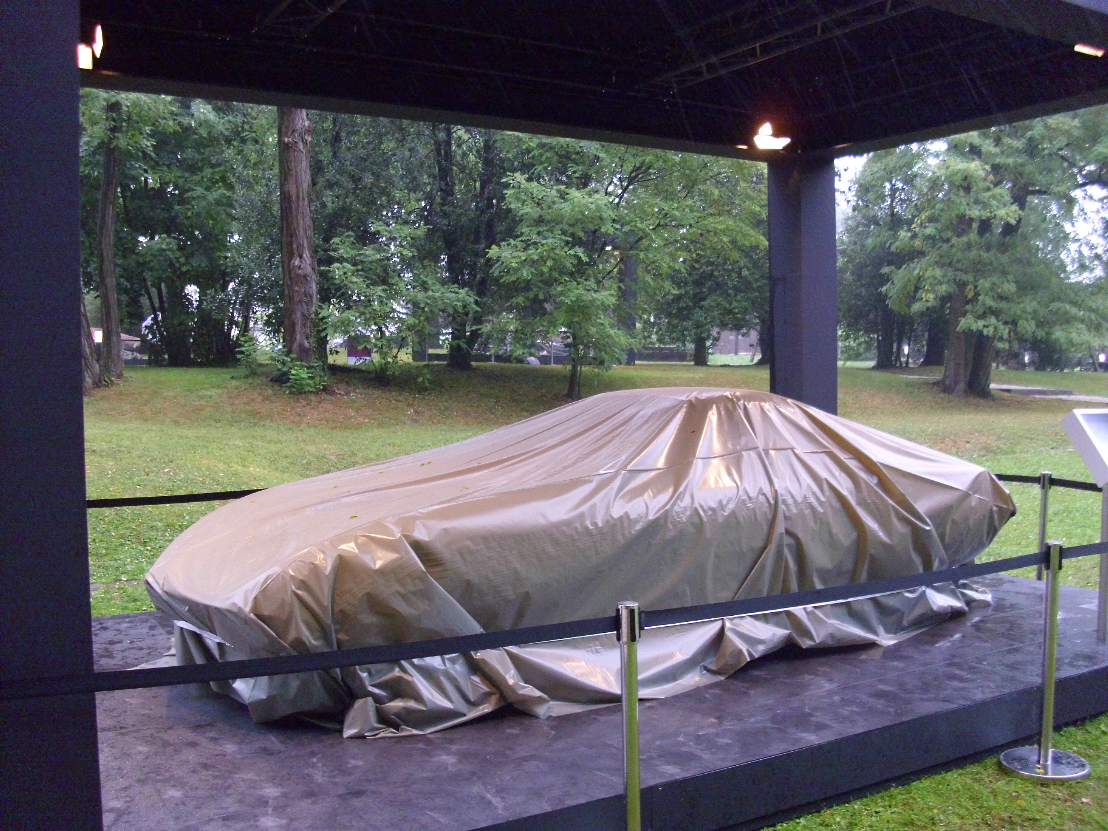 Lamborghini 350 GTV von 1963, Schloss Bensberg Classics 2013